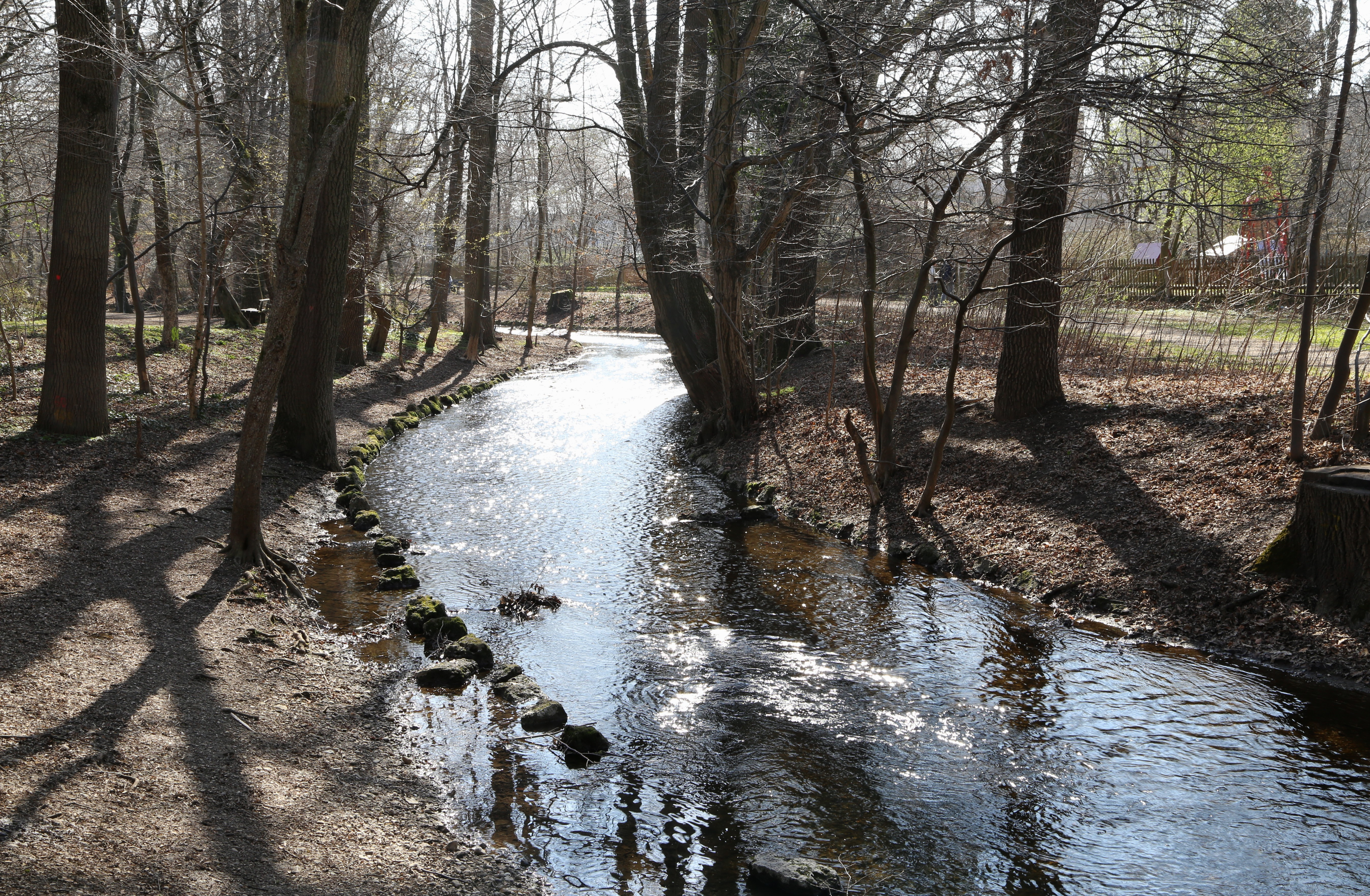 Würm im Pasinger Stadtpark, München Landschaftsschutzgebiet Würmniederung mit Erweiterungen bis zur Stadtgrenze (LSG-00120.19)